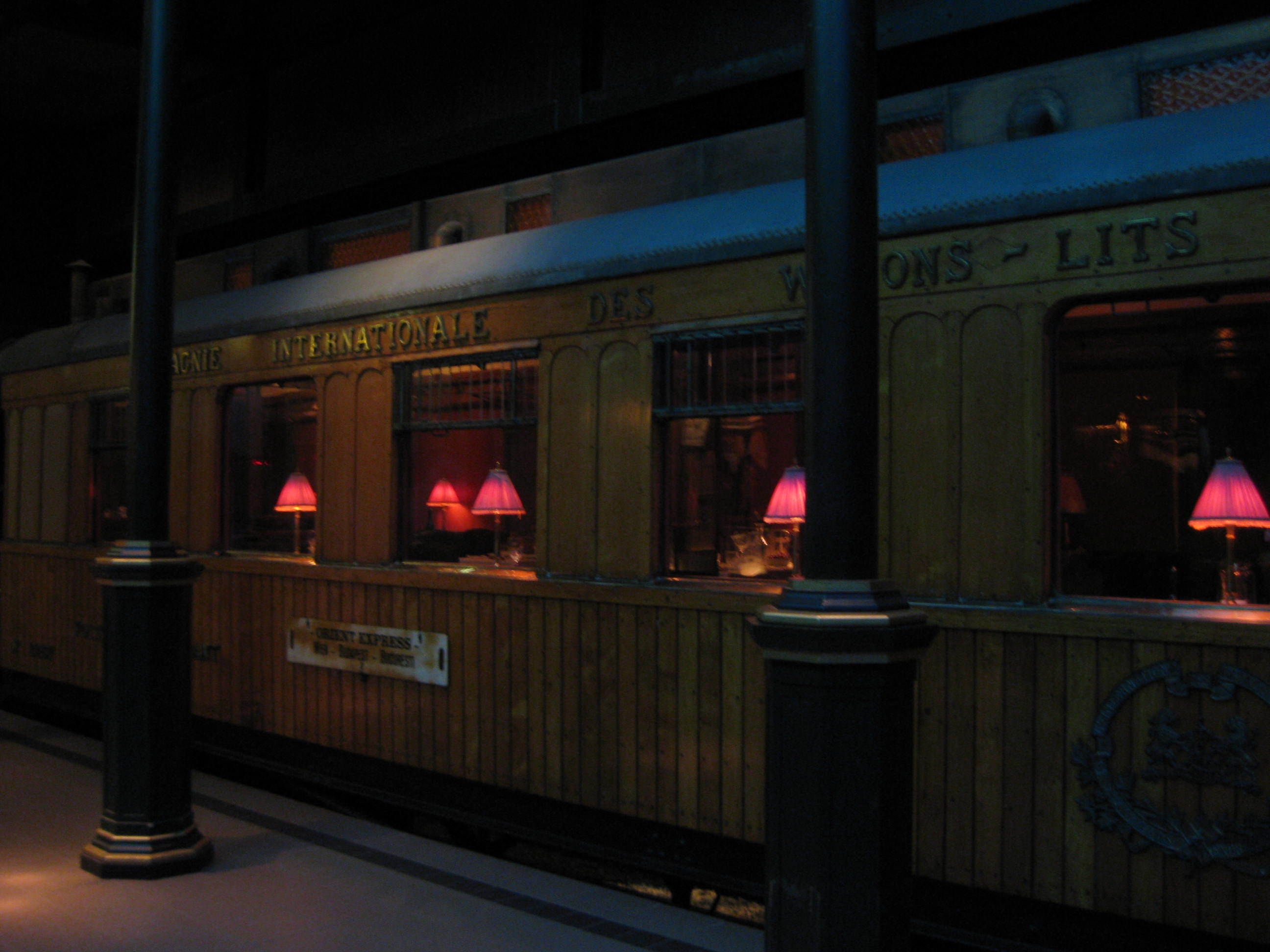 Wagon van de Oriënt-Express in het Nederlands Spoorwegmuseum in Utrecht